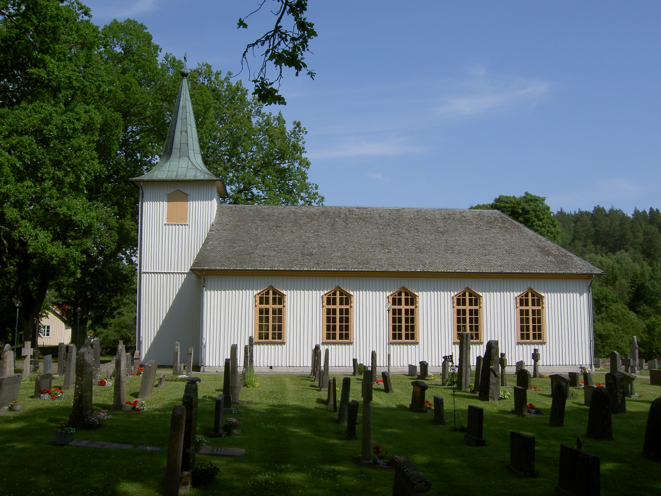 Tisselskogs kyrka